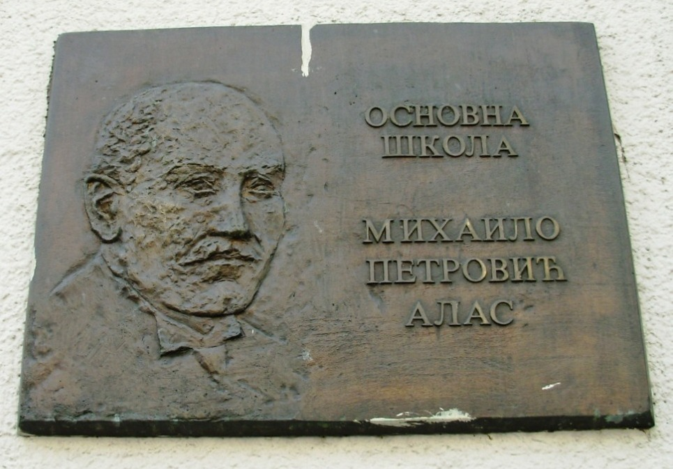 Mihajlo Petrović Alas, tabla na istoimenoj osnovnoj školi u Beogradu. Slikao Goldfinger